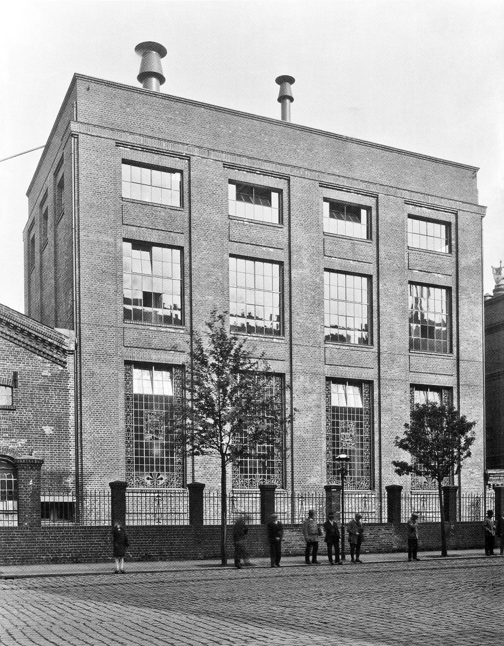 Sudhaus der Brauerei C. W. Naumann in der Zschocherschen Straße 79, Leipzig. Ein Teil der Brauereigebäude sind heute abgerissen.